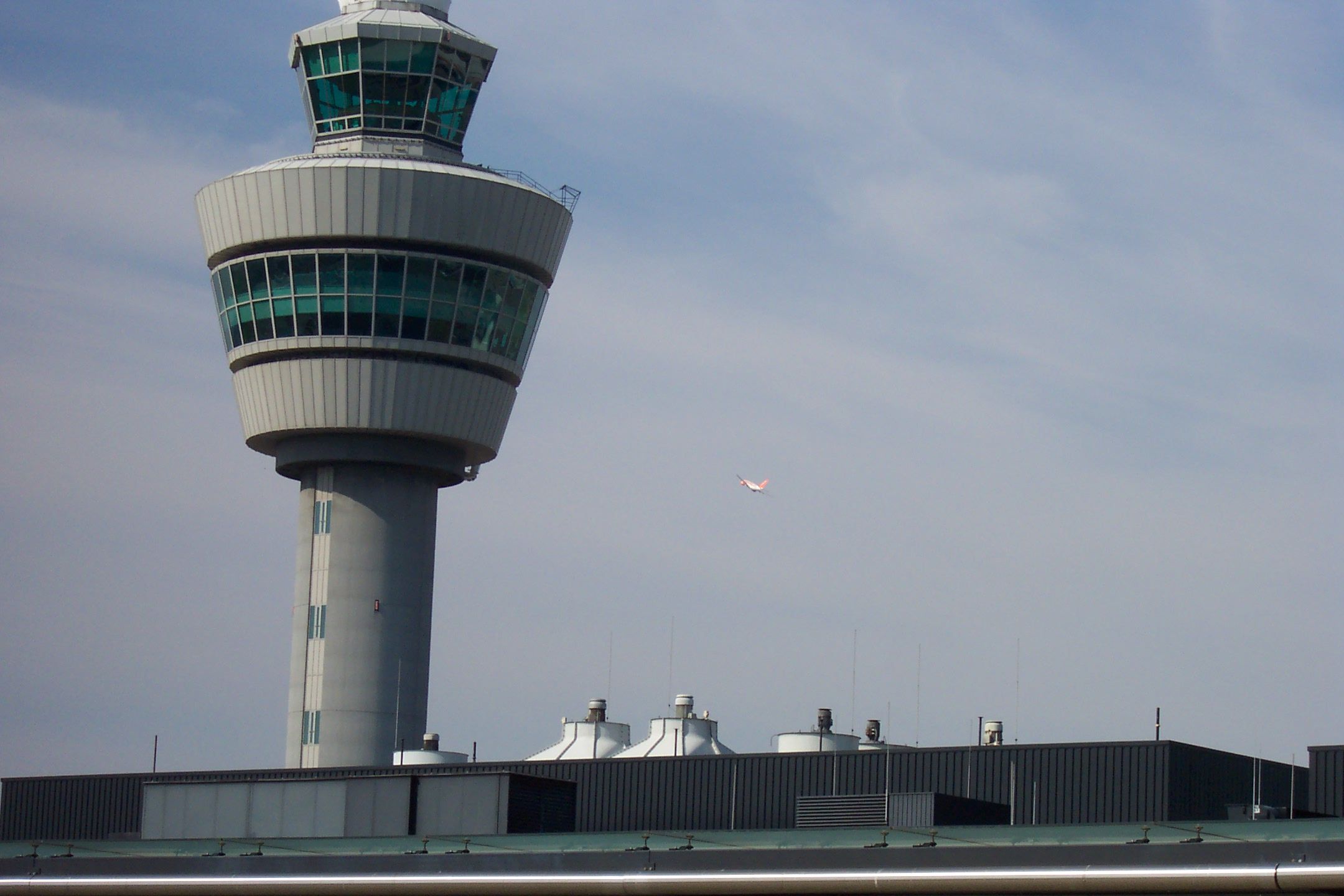 Flughafen Schiphol, Amsterdam, Niederlande